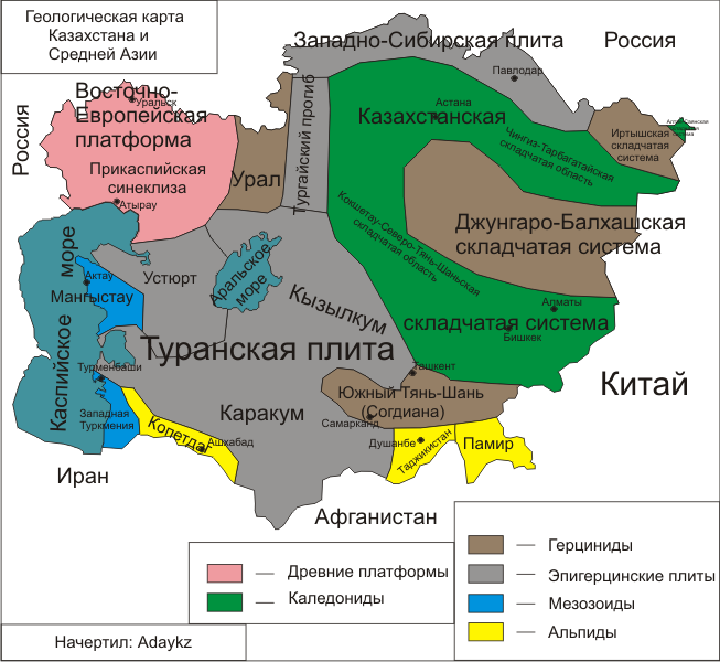 Carta geologica dell'Asia Centrale